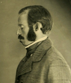 Il naturalista Gregorio Sebastio